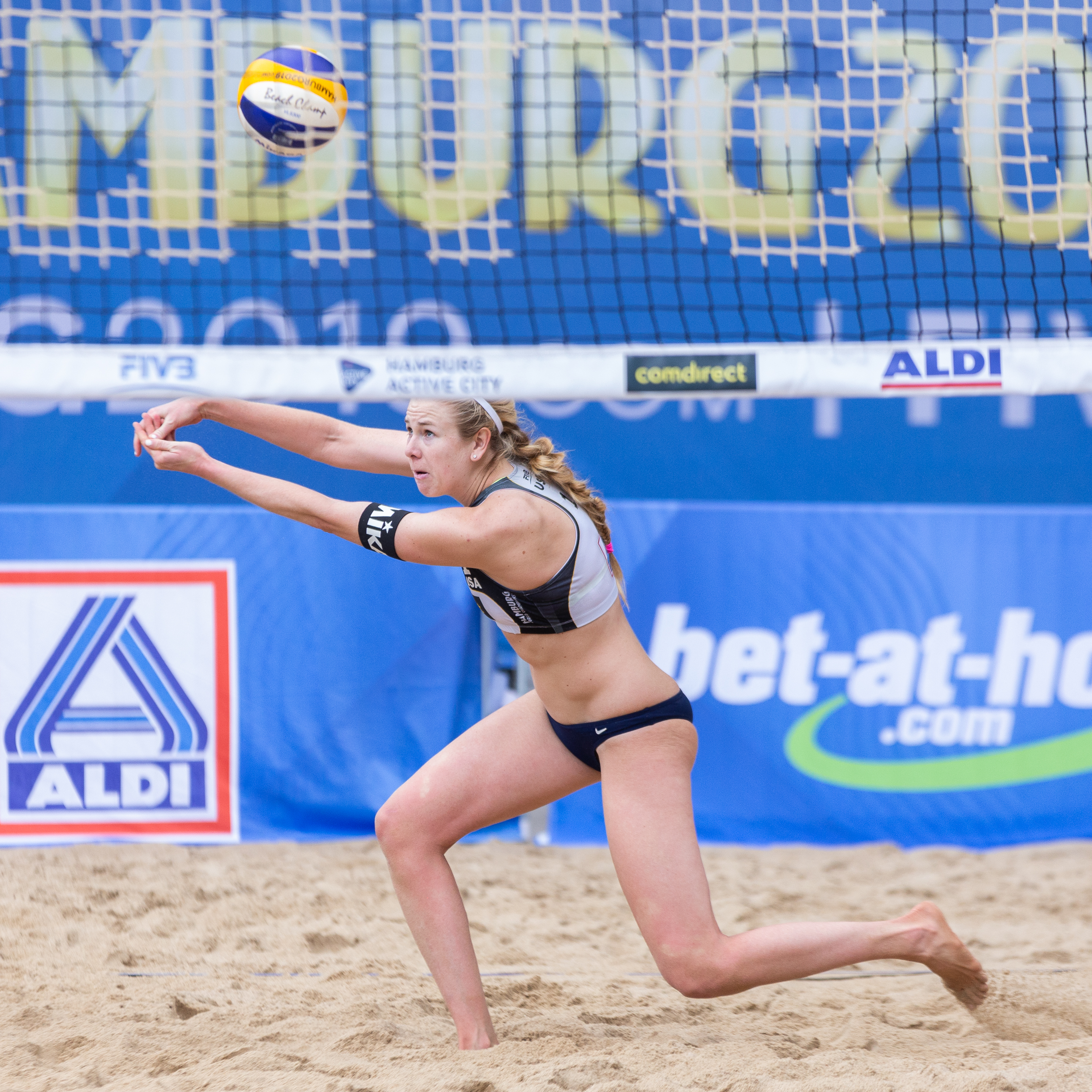 BeachVolleyball Weltmeisterschaft Hamburg 2019; Summer Ross (USA)